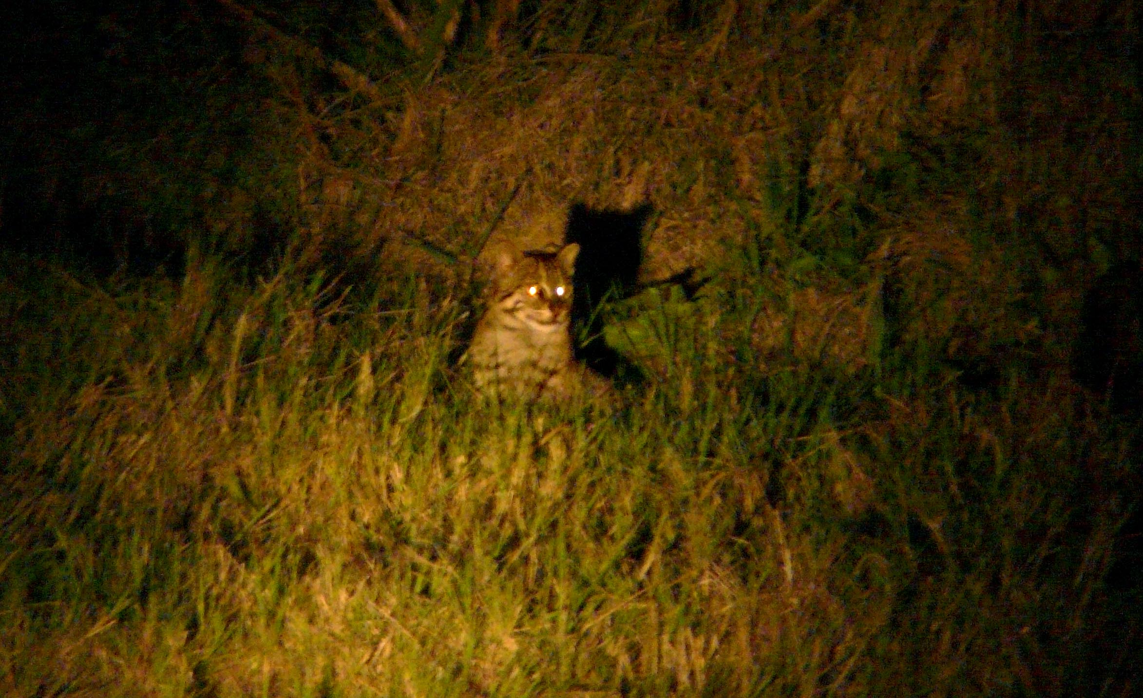 Un Chat pêcheur (Prionailurus viverrinus), de nuit, au Népal.